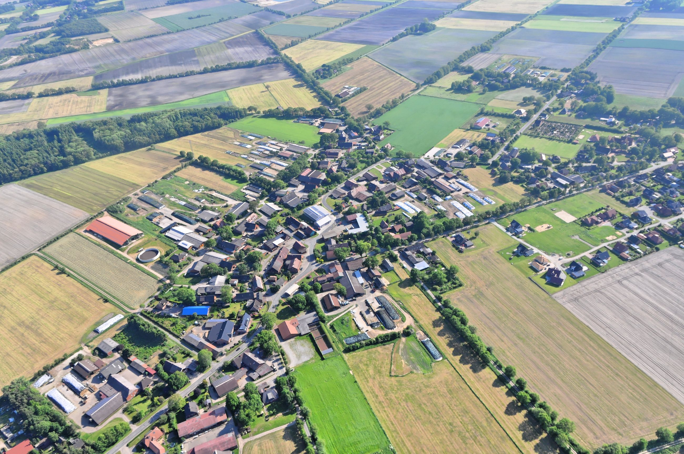 Überführungsflug vom Flugplatz Nordholz-Spieka über Lüneburg, Potsdam zum Flugplatz Schwarzheide-Schipkau